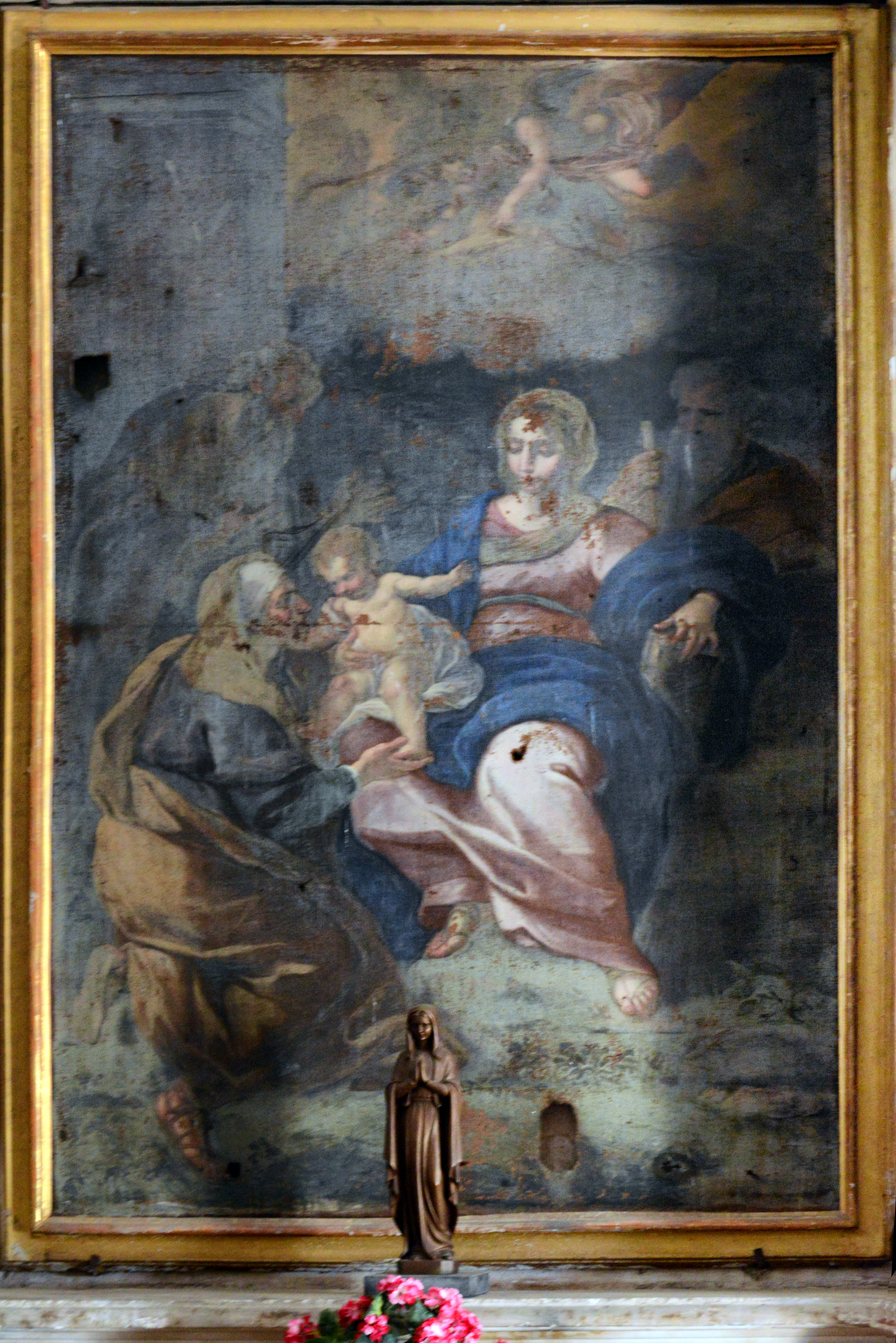 Cateri, Balagne (Corse) - Tableau Saint Roch intercédant aux pieds de la Vierge pour les pestiférés (XVIIIe s. - auteur inconnu) dans l'église du couvent de Marcasso.